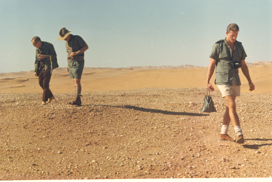 Dr. Charles Koch (regs), Gobabeb se eerste direkteur, op 'n ekskursie na die gruisvlakte.